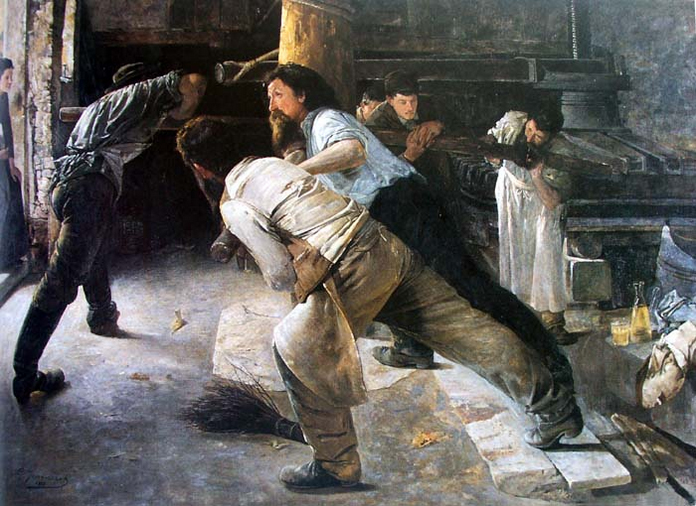 Les Pressureurs